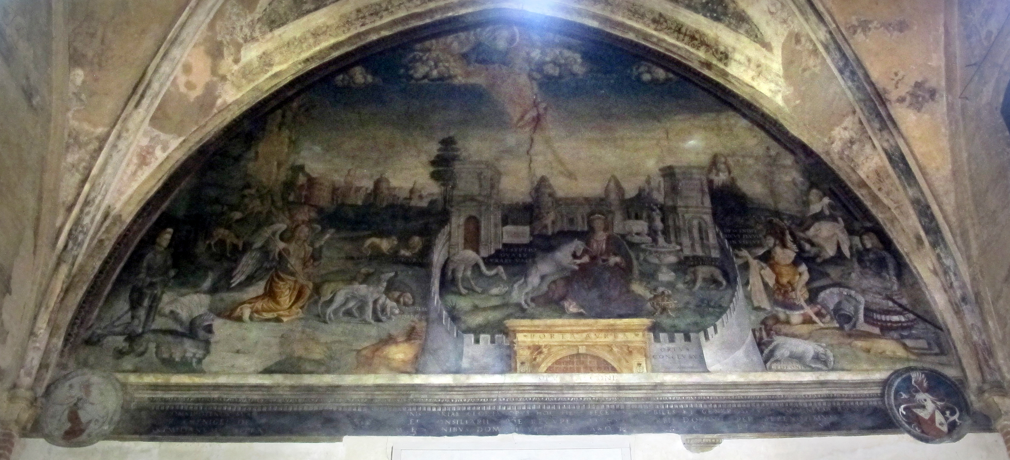 Verona, Italia